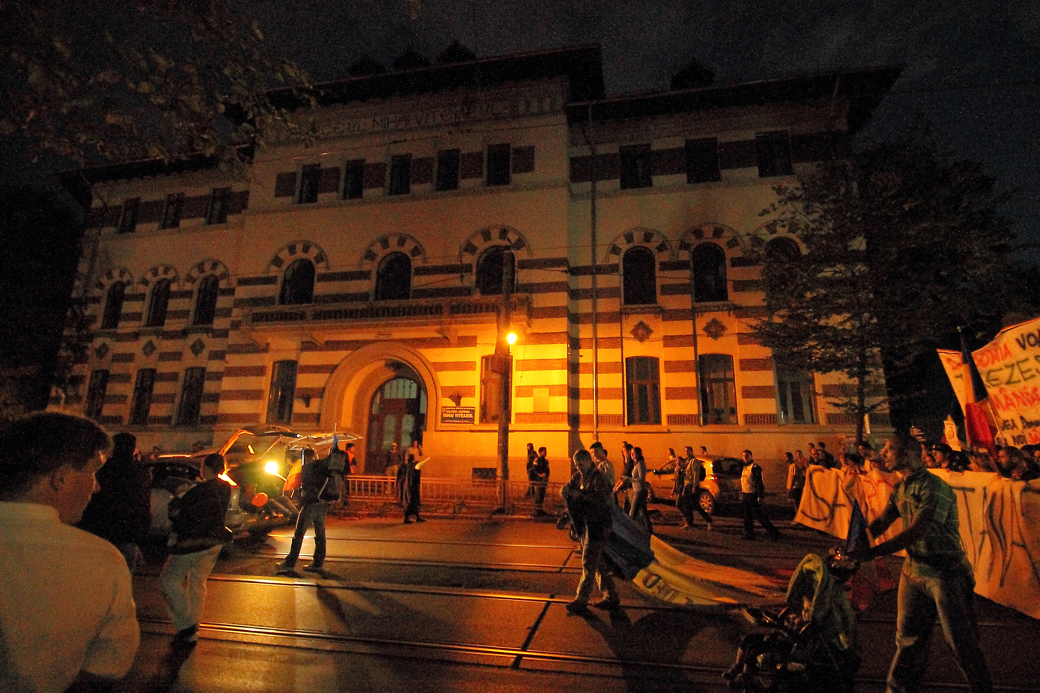 Colegiul Național „Mihai Viteazul“ din București